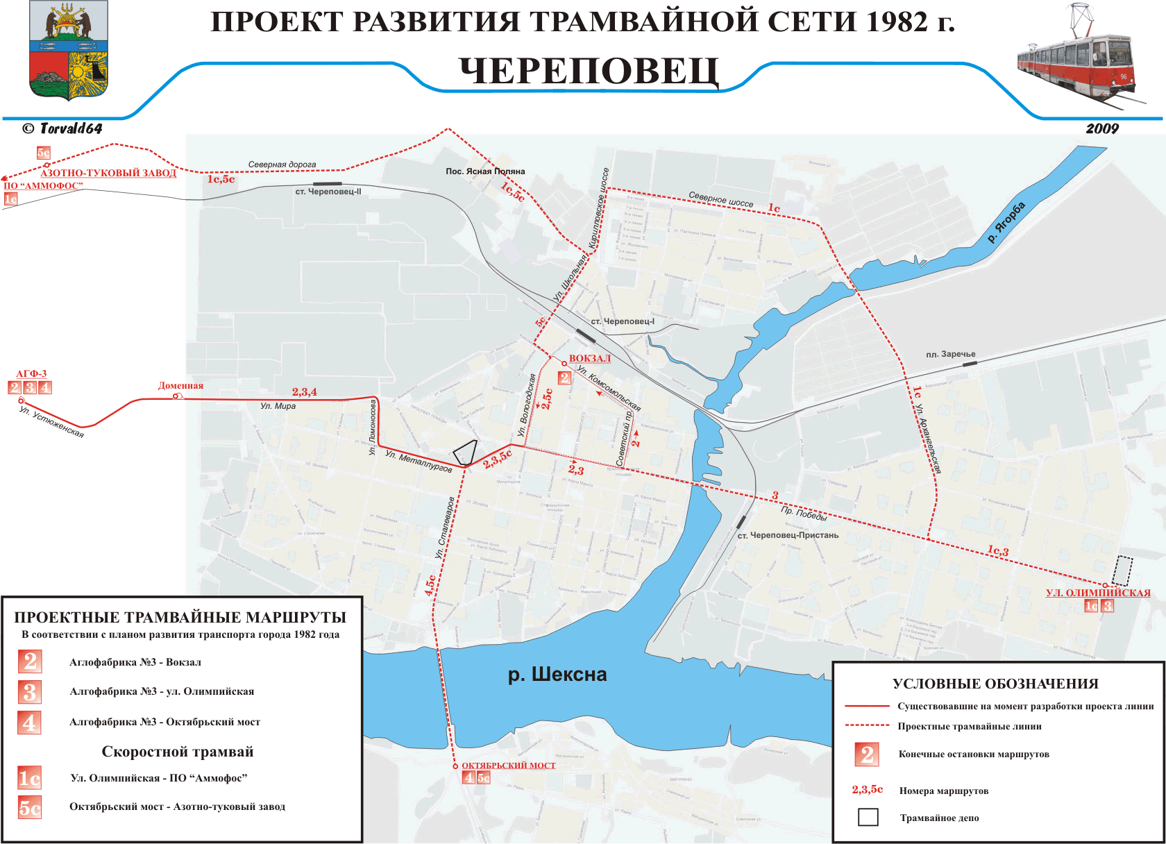 Проект развития трамвая г. Череповца 1982 г.